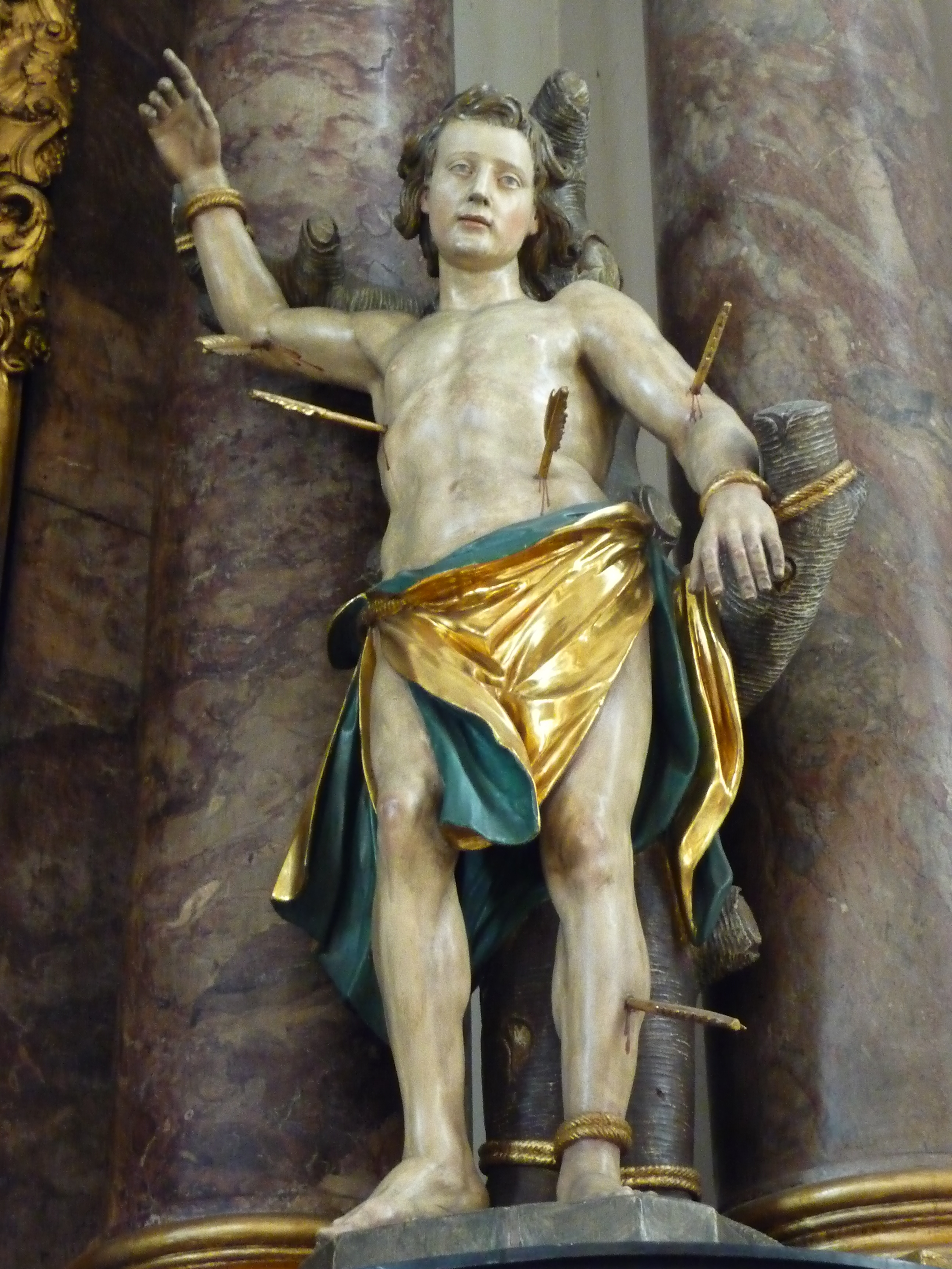 Darstellung des Heiligen Sebastian in der Kirche St. Sebastian in Mannheim (Baden-Württemberg, Deutschland), Figur am Altar im rechten Seitenschiff